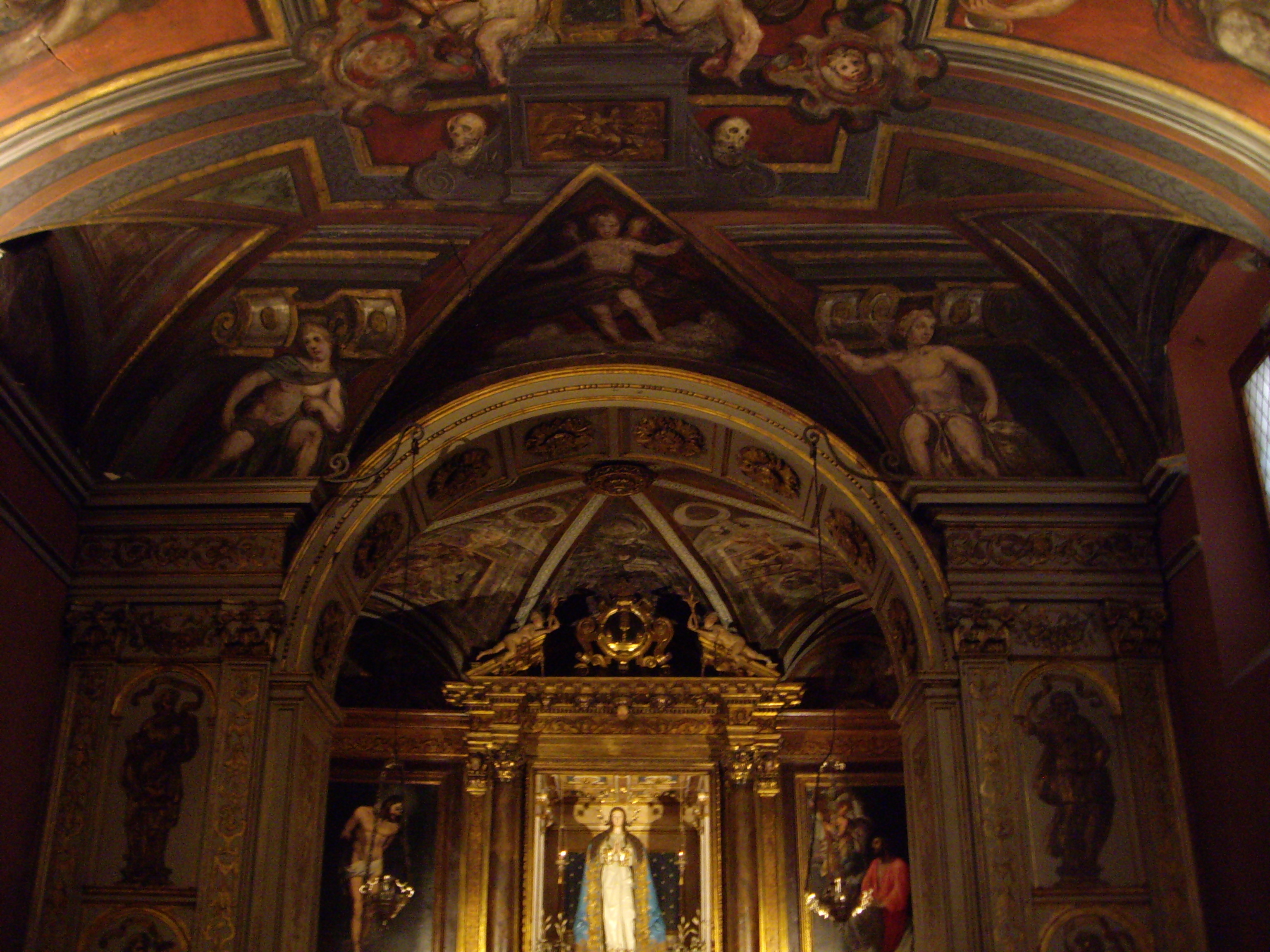 Frescos de la Capella de la Immaculada.